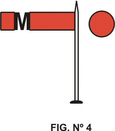 Es un dibujo del brazo de una señal argentina de maniobras.